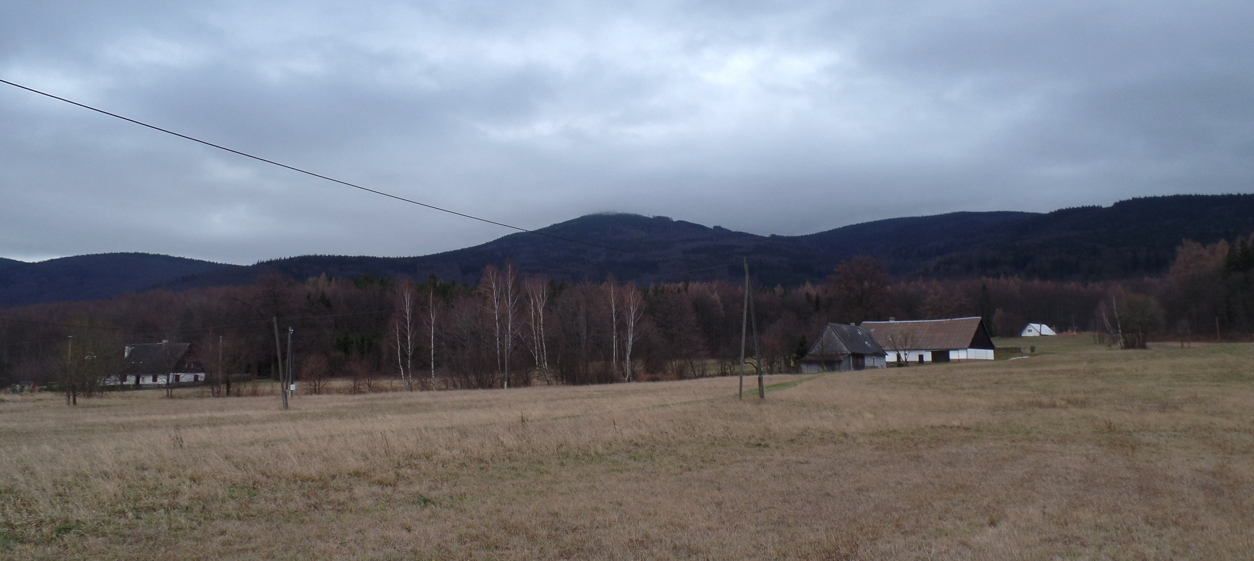 Staré Podhradí część miejscowości (Černá Voda)